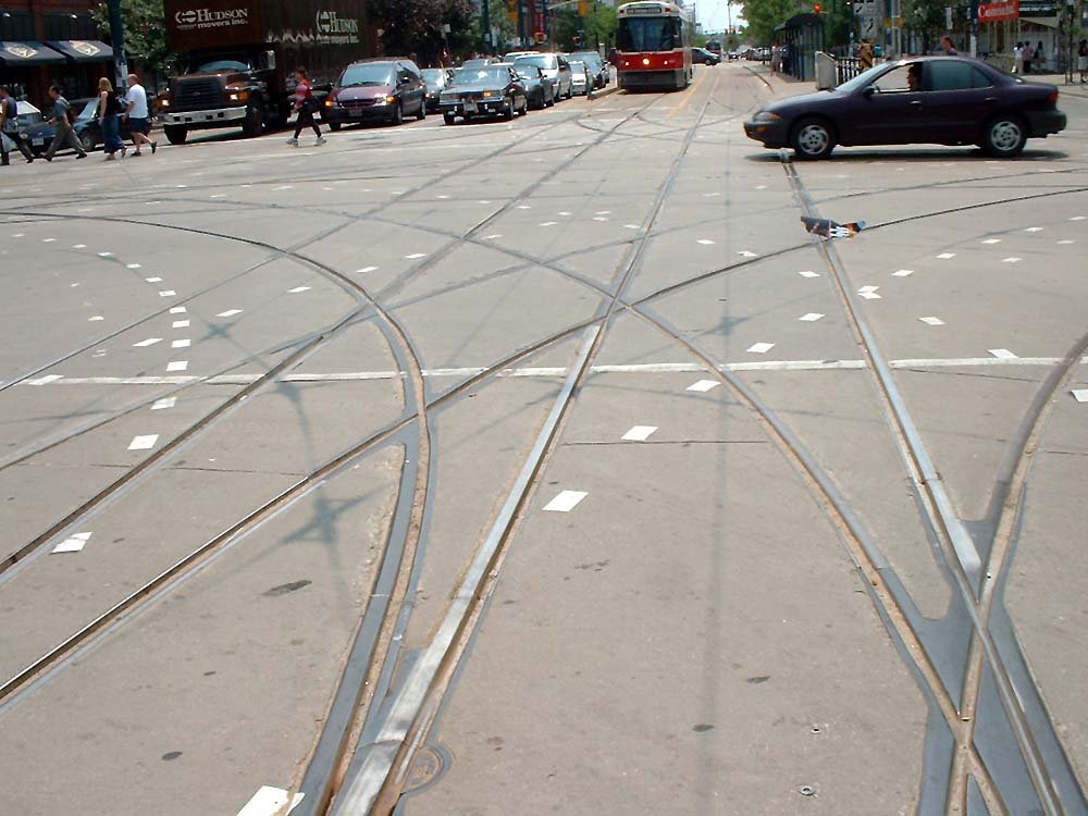 A "grand junction" in Toronto, at the intersection of Spadina and Queen. A streetcar coming from any direction can turn in any other direction. The special trackwork of a grand junction is complex, and must be custom-made to fit the geometry of the intersection. This can be done much more easily with modern computer-controlled machinery. Une «grande jonction», à Toronto, entre les lignes Spadina et Queen. Un tramway venant de n’importe-quelle direction peut tourner dans n’importe-quelle autre direction. On notera la complexité de l’enchevêtrement des cœurs d’aiguillage. Ces cœurs doivent être fabriqués sur mesure, les disposition relatives des voies n’étant jamais les mêmes, ce qui en change la géométrie d’un endroit à l’autre. Cette fabrication sur mesure a été grandement facilité avec l’avènement de machines-outils à commande numérique. On notera en bas à droite, sur le deuxième cœur vers le haut que sa pointe n’est pas usée, mais que le fond de la gorge comporte des marques d’usure. C’est qu'à cet endroit, les tramways qui y passent sont supportés par le boudin et non pas le plat de la roue. Cette disposition est souvent utilisée pour diminuer le bruit du passage des roues dans la discontinuité de la surface de roulement.